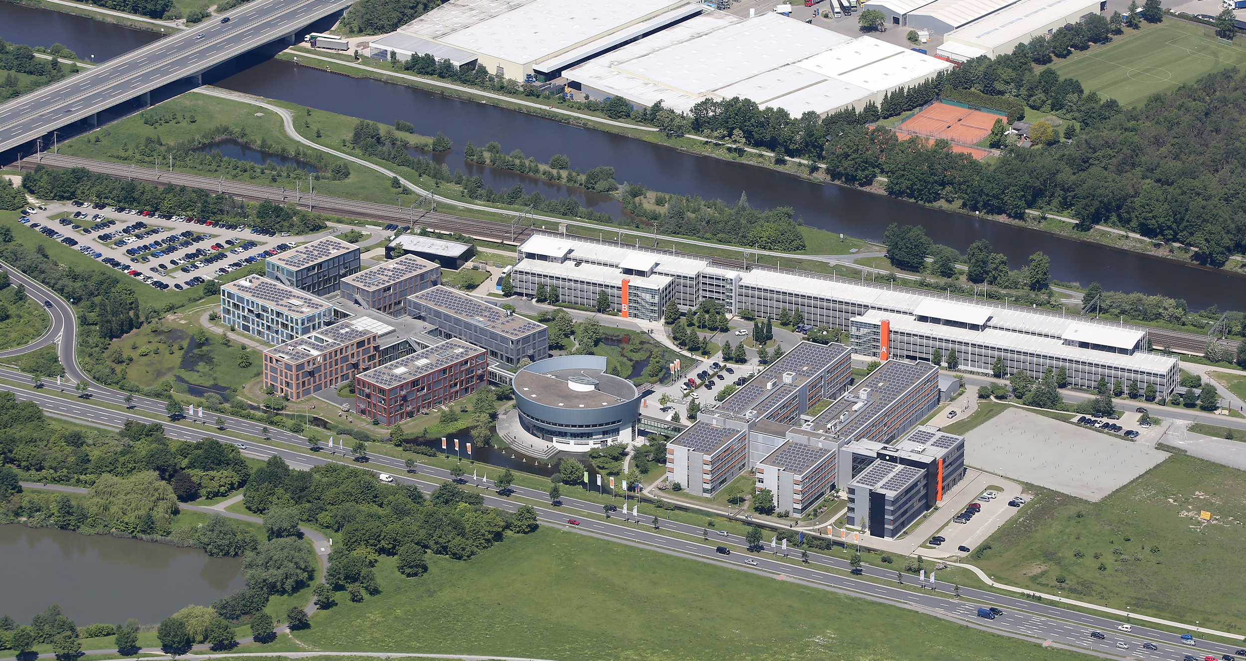 Forum AutoVision Luftbild in Wolfsburg